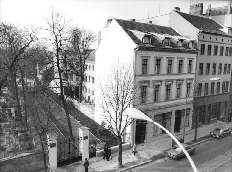 ADN-Zentralbild -Link 15.2.1978 "Brecht-Haus Berlin" der Öffentlichkeit übergeben. Das in den vergangenen Monaten von Grund auf rekonstruierte alte Mietshaus in der Berliner Chausseestraße 125, in dem der sozialistische Dichter und Dramatiker Bertolt Brecht von 1953 bis zu seinem Tode 1956 und seine Lebesgefährtin Helene Weigel bis 1971 wohnten, wurde am 9.2.78 als Forschungs- und Gedenkstätte der Öffentlichkeit übergeben. Die Einweihung bildete den Auftakt der Ehrungen anläßlich des 80. Geburtstages von Bertolt Brecht am 10.2. Neben dem originalgetreu wiederhergestellten Wohn- und Arbeitsräumen von Bertolt Brecht und Helene Weigel beherbergt das Haus das Brecht-Zentrum der DDR, das Bertolt-Brecht-Archiv und das Helene-Weigel-Archiv der Akademie der Künste der DDR. Im Brecht-Weigel-Archiv sind rund 300000 Dokumente untergebracht. Darunter der fast vollständige literarische Nachlaß des Dichters mit 75000 Blatt Handschriftten und Typoskripten. Ferner enthält es etwa 10000 Buchausgaben von und über Brecht in 50 Sprachen und ungefähr 100000 Presseveröffentlichungen sowie Schallplatten und Tonbänder. Zum Brecht-Archiv gehören auch Leseräume, die Wissenschaftlern, Theaterleuten und anderen Interessierten Arbeitsmöglichkeiten bieten. - Links neben dem Brecht-Haus der Dorothenstädtische Friedhof, auf dem Bertolt Brecht und Helene Weigel ihre letzte Ruhestätte haben.